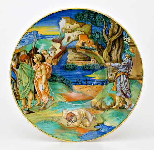 Piatto istoriato dipinto da Xanto Avelli. Urbino XVI secolo